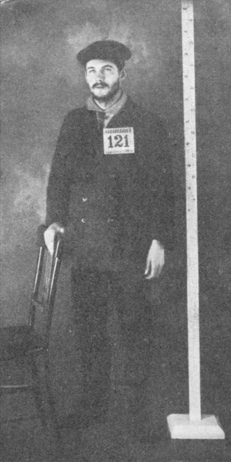 Aarne Sihvo santarmien valokuvattavana